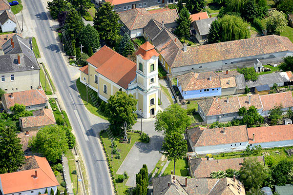 Légi fotó